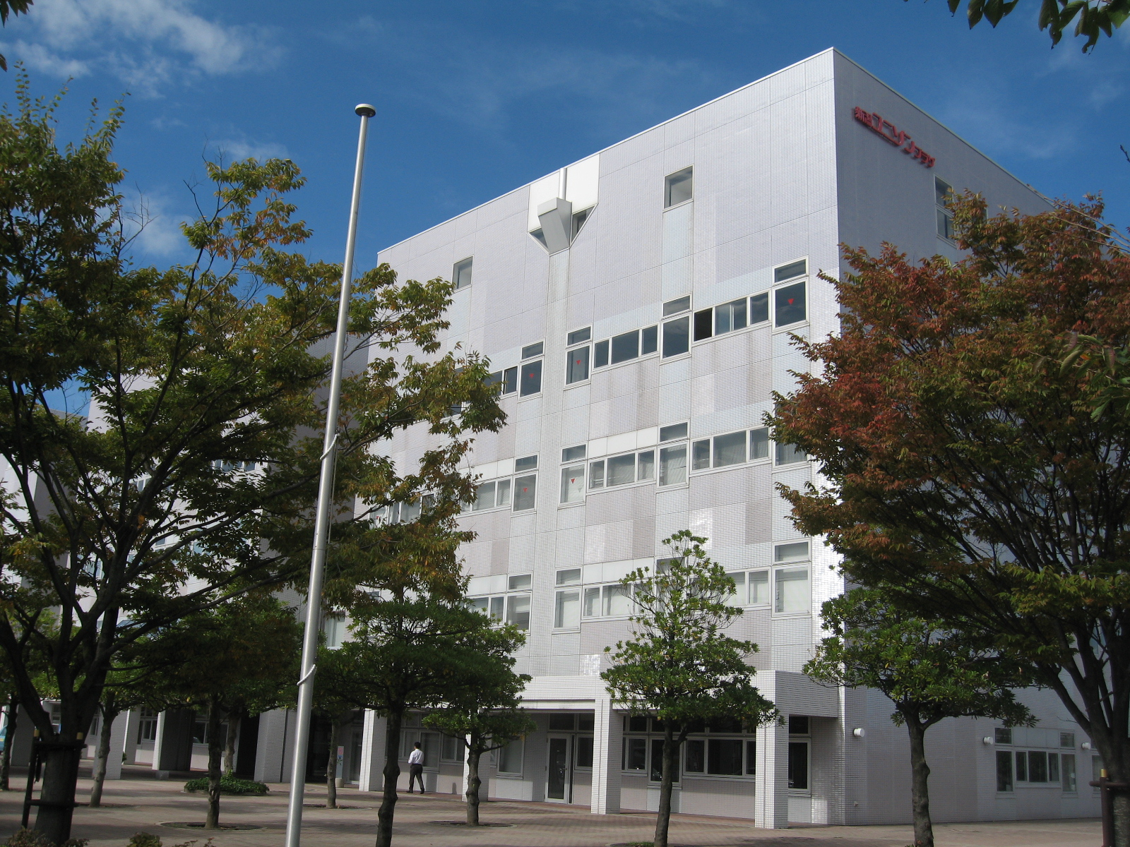 新潟ユニゾンプラザの画像。